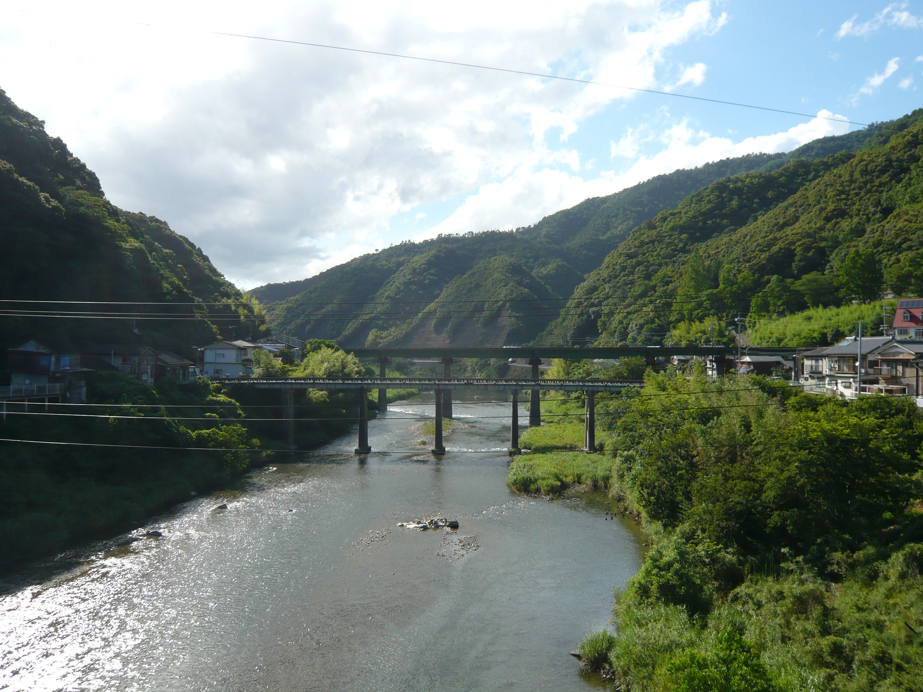 江川崎の四万十川